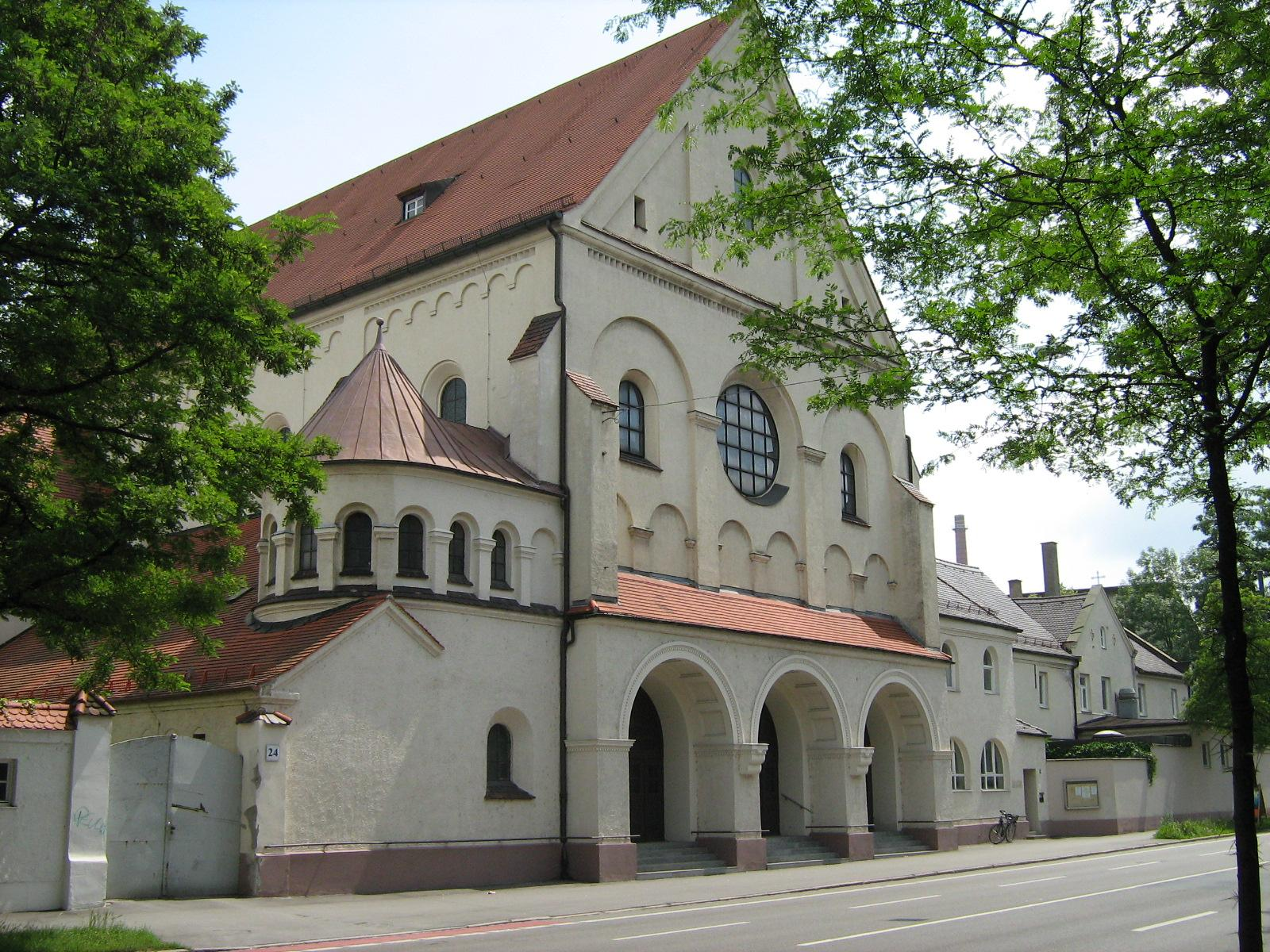 Ehemaliges Kapuziner-Kloster Sankt Sebastian Augsburg (Franziskanisches Zentrum St. Sebastian) - Halbinsel im MAN-Firmengelände